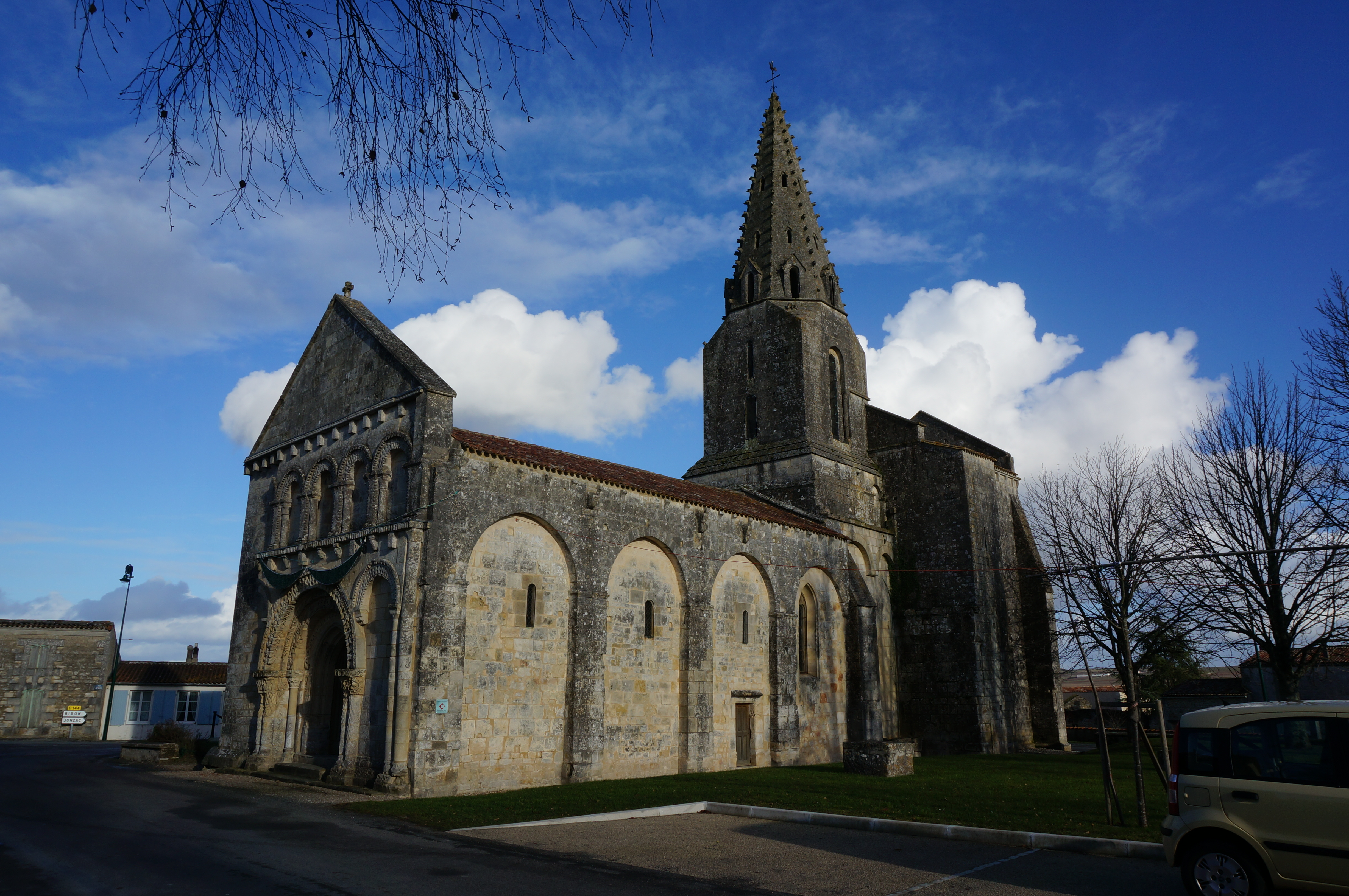 Face sud de l'église.